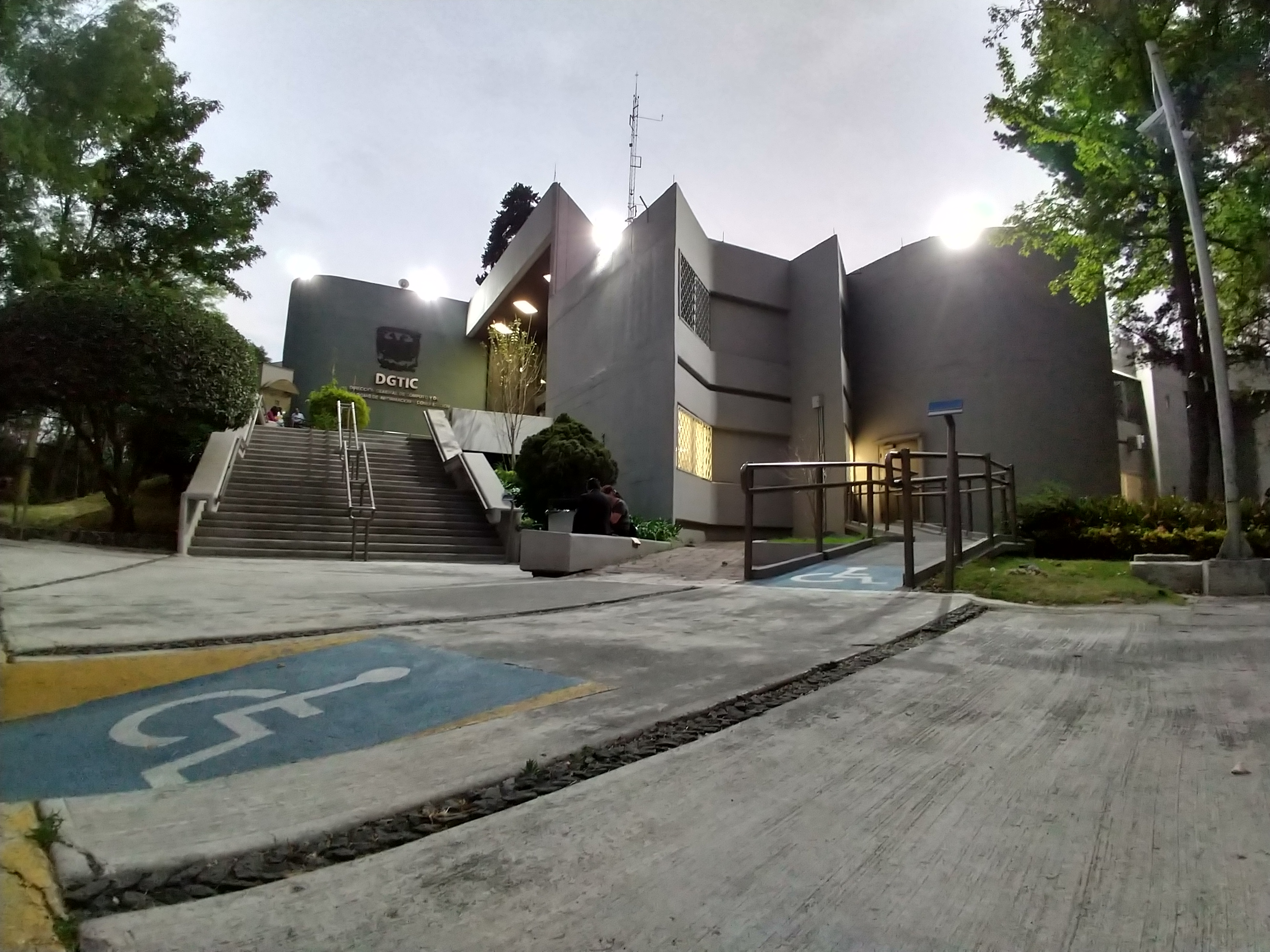 Edificio principal de la DGTIC en Ciudad Universitaria de la UNAM.